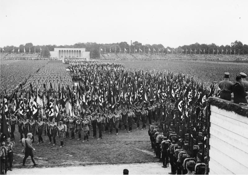 Nürnberg, Reichsparteitag, SA-Aufmarsch Reichsparteitag 1933, Aufmarsch der Fahnen der SA [Nürnberg.- Reichsparteitag der NSdAP, "Reichsparteitag des Sieges", Aufmarsch von SA mit Hakenkreuz-Fahnen, 30. August - 3. September 1933]